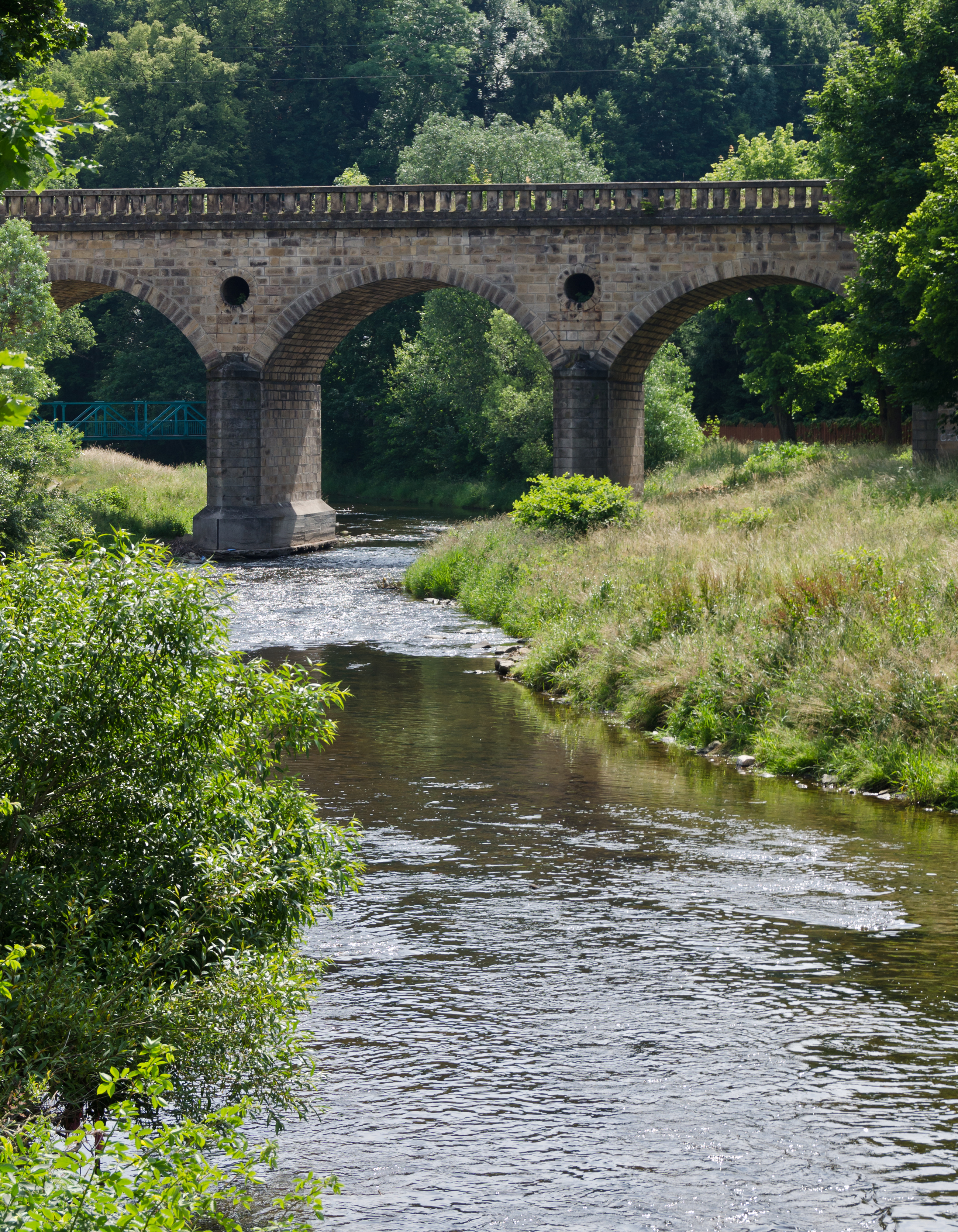 Nysa Kłodzka, most w Bystrzycy Kłodzkiej